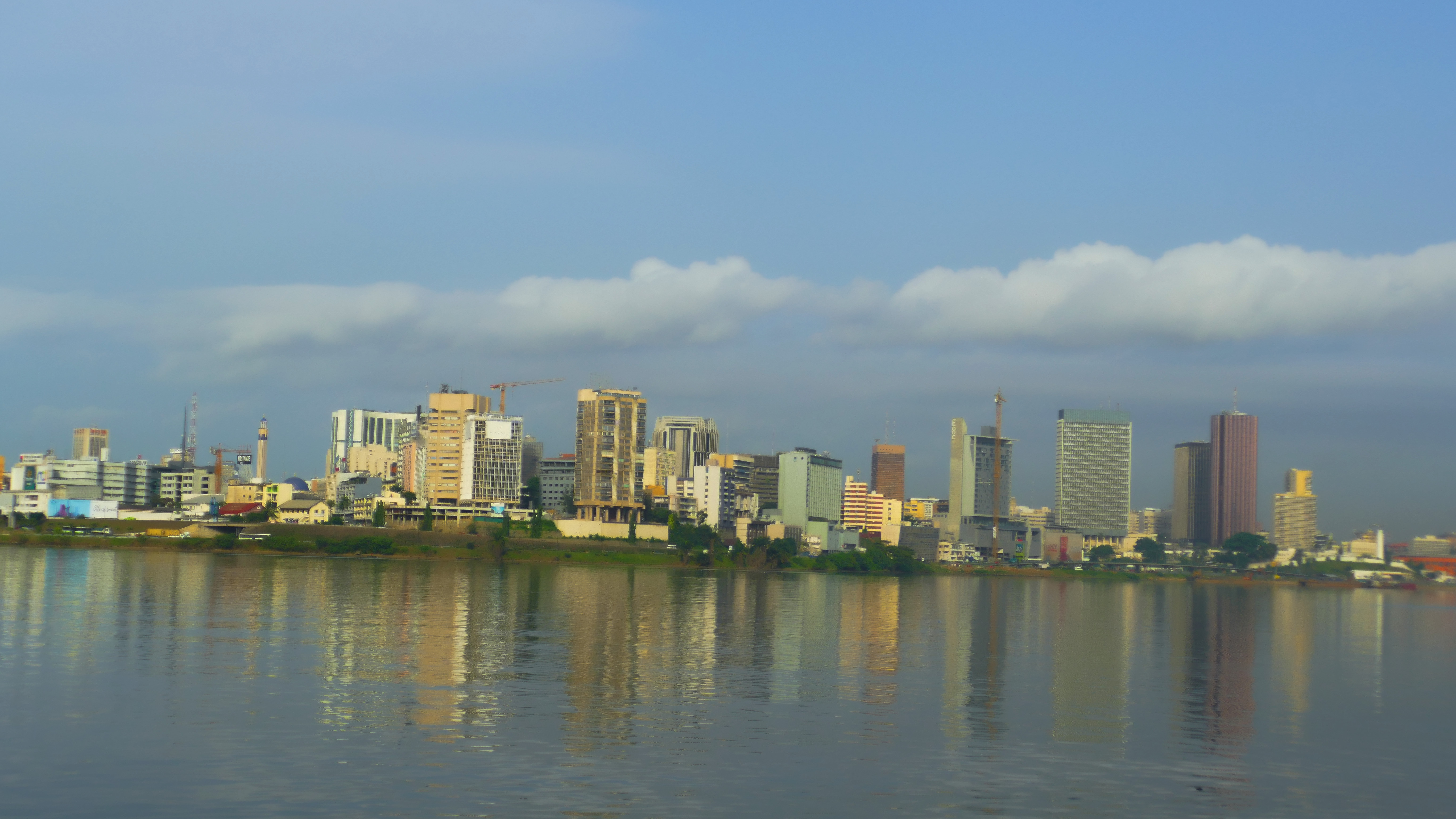 Une vue de la Lagune Ebrié d'Abidjan This is an image with the theme "Africa on the Move or Transport" from: Ivory Coast